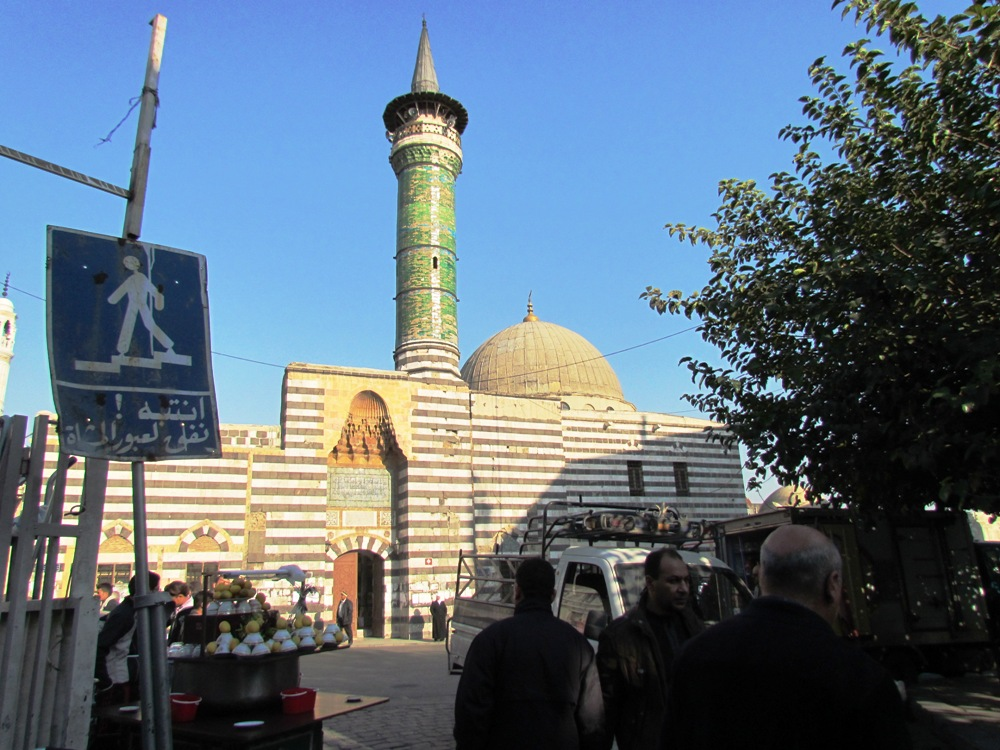 جامع بناه سنان باشا